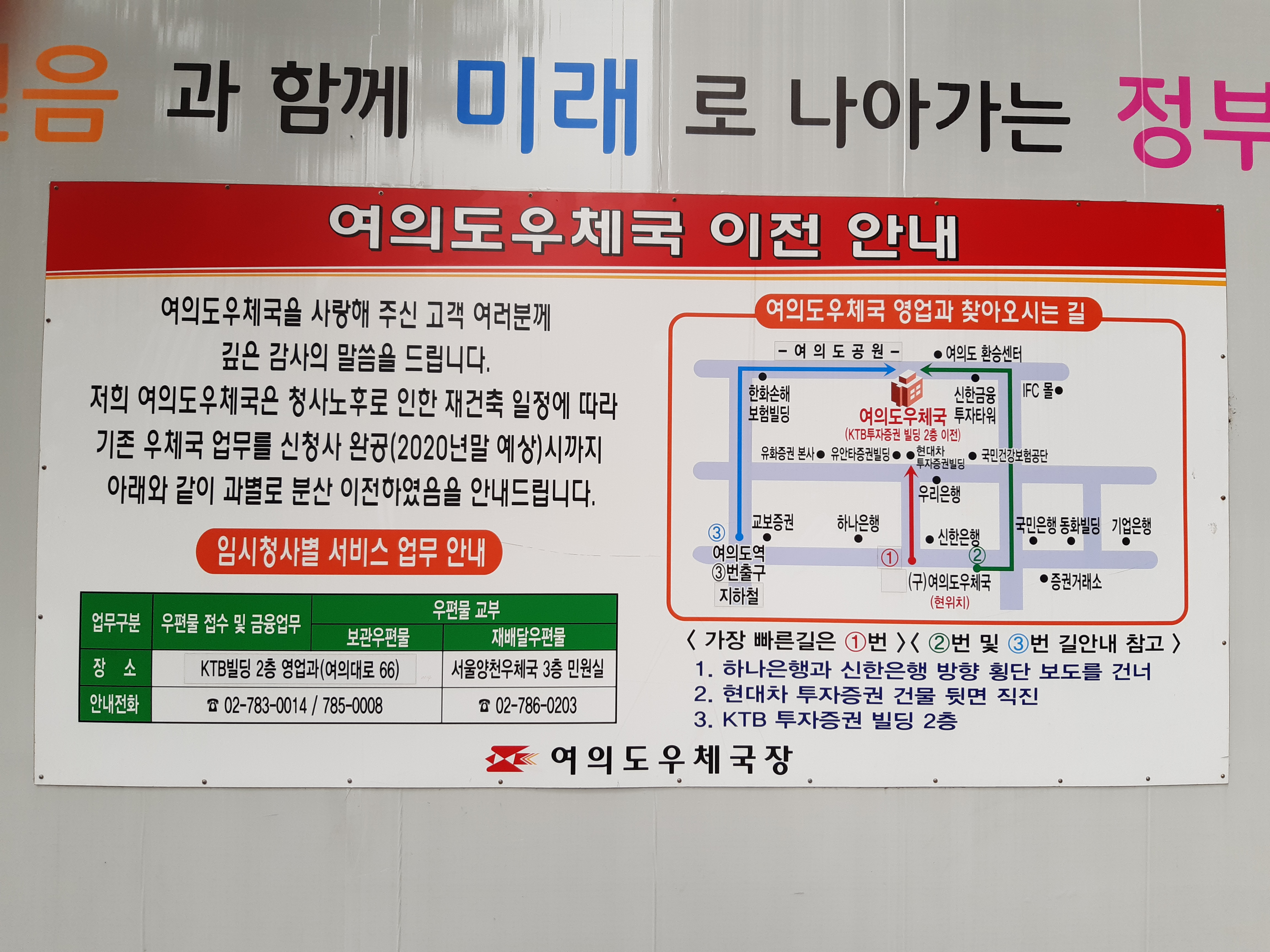 여의도우체국 임시 이전 안내판